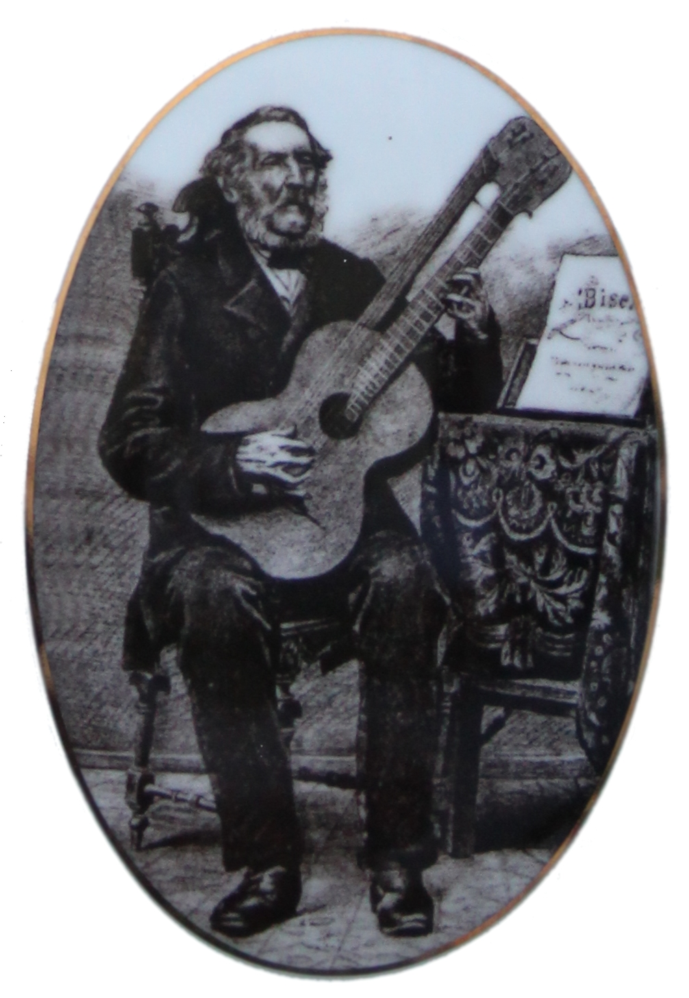 zdjęcie z nagrobka Ivana Padoveca